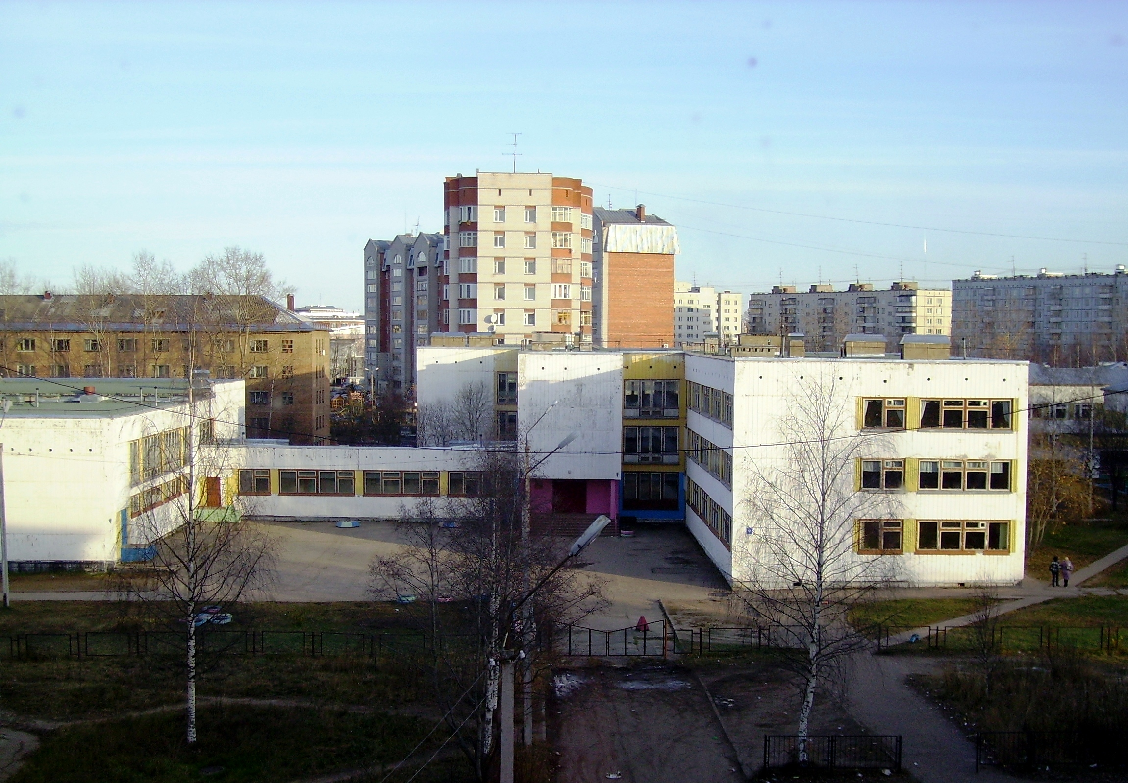 Муниципальное общеобразовательное учреждение Средняя общеобразовательная школа № 18 г.Сыктывкара